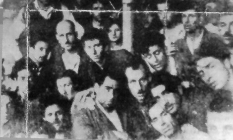 קבוצת ניצולים מטביעתה של הסלבדור